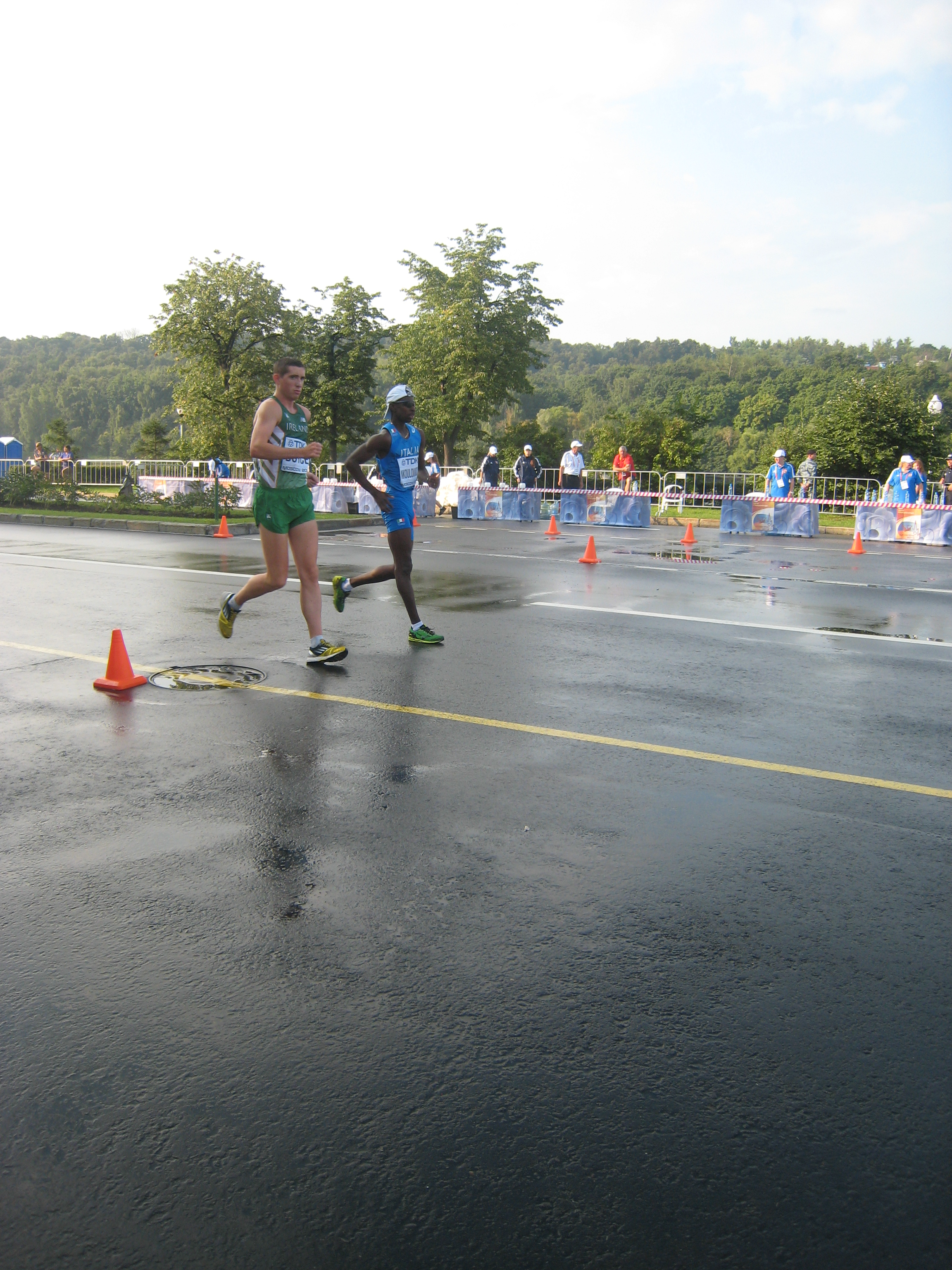 Чемпионат мира по лёгкой атлетике 2013. Ходьба 50 км, мужчины. Ирландец Брендан Бойз и итальянец Жан-Жак Нкоулукиди